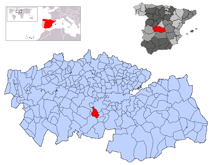 Gálvez en la provincia de Toledo